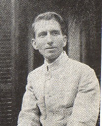 Guido Gozzano da La letteratura italiana Zanichelli, foto con la madre nella villa di Agliè (TO). Scansionata, salvata, modificata -- Paola 16:15, Feb 27, 2005 (UTC) Gozzano, Guido